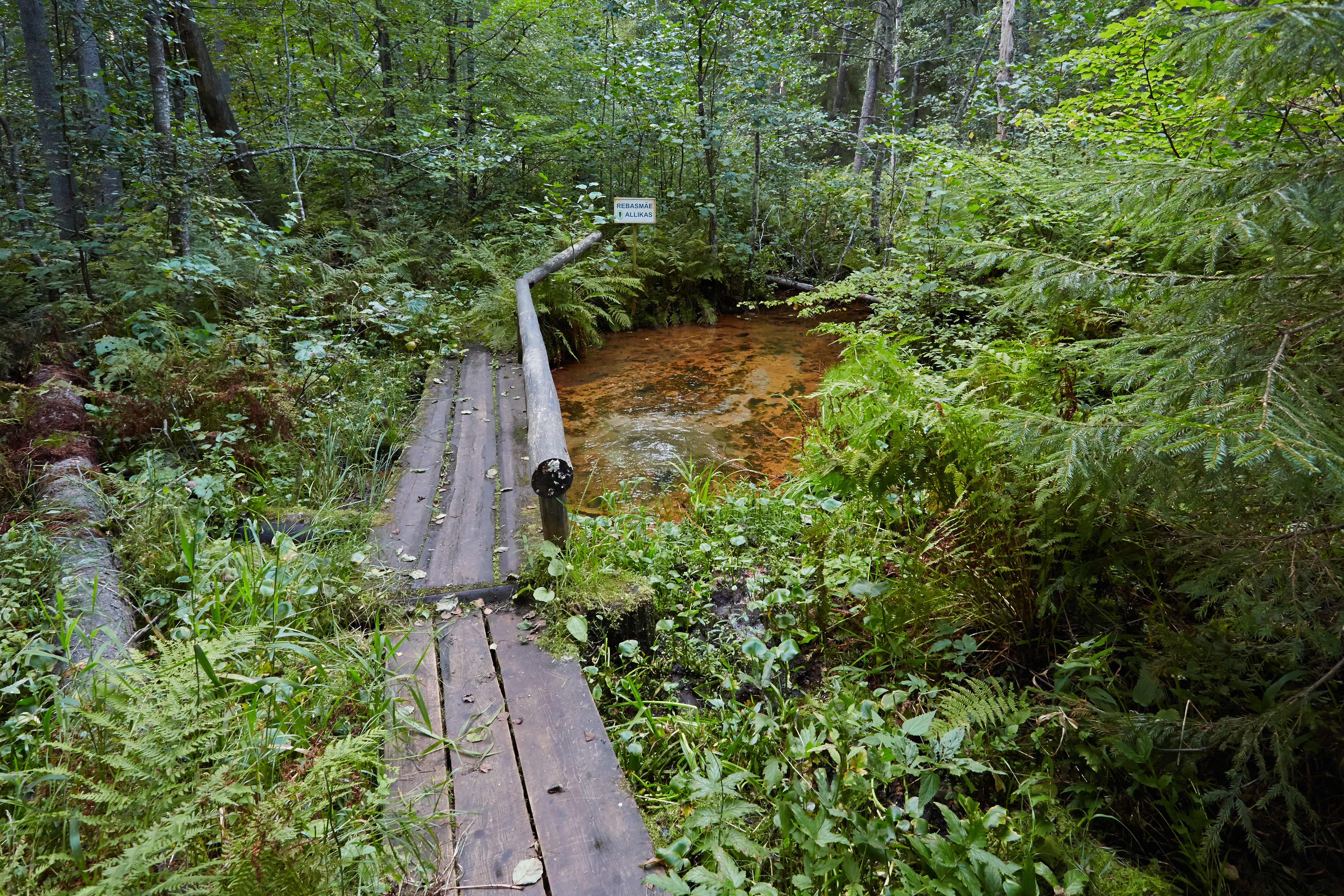 Rebasmäe allikas Põlvamaal 2013. aasta augustis.